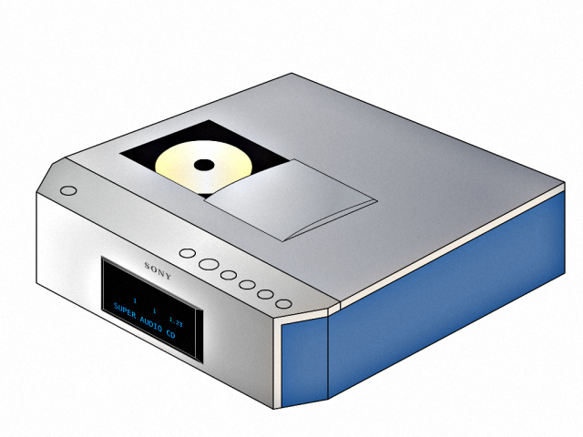 SCD-1, pierwszy odtwarzacz płyt SACD produkcji Sony Autor grafiki: Faxe, licencja GNU FDL